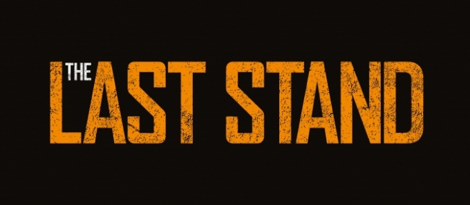 The Last Stand Titelschriftzug